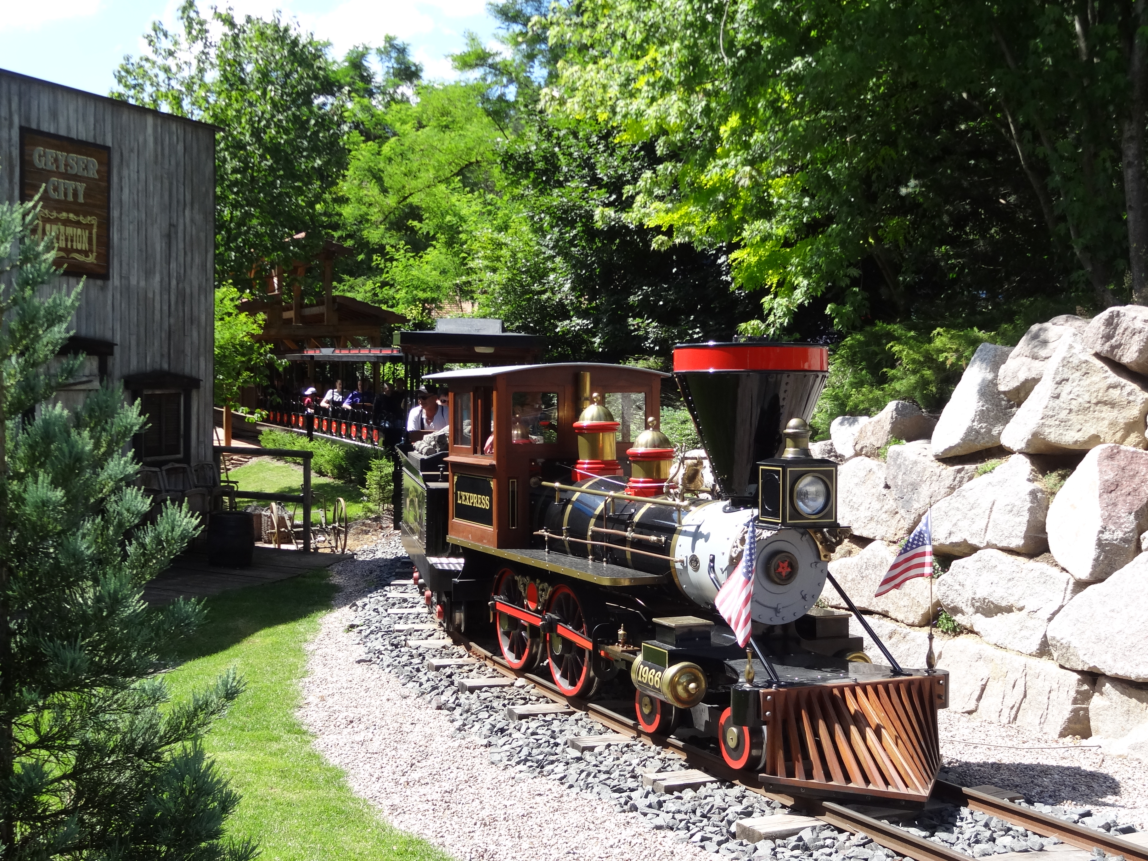 L'Express à Fraispertuis City